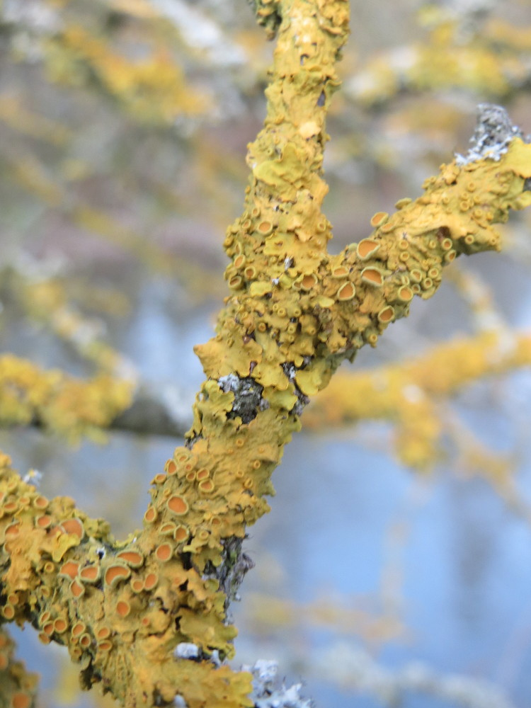 Gewöhnliche Gelbflechte (Xanthoria parietina) in Hockenheim